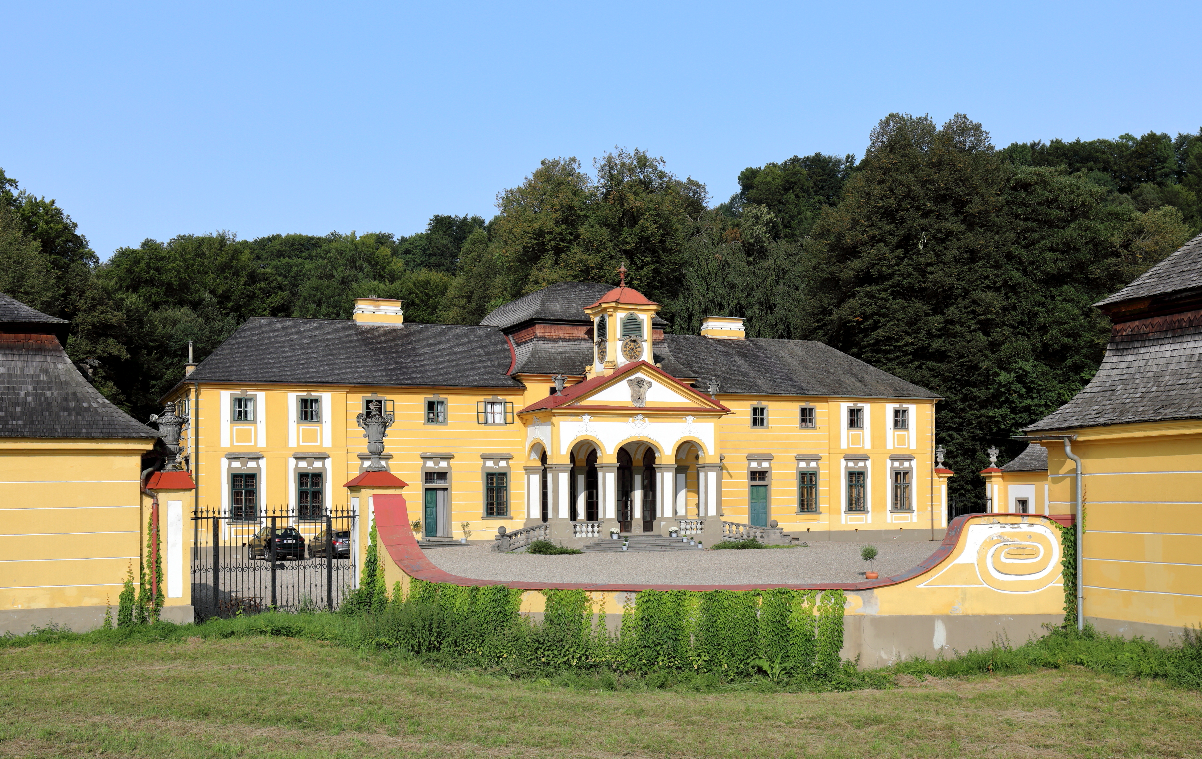 Hauptflügel des Schlosses Neuwartenburg in der oberösterreichischen Marktgemeinde Timelkam.Das spätbarocke Schloss umfasst das Haupthaus und einen von zwei Seitentrakten und einem Portal mit zwei Torpavillons Richtung Osten eingefassenen Ehrenhof. Das Schloss ließ Johann Albert Graf Saint-Julien-Wallsee (1673–1766) von 1730 bis 1732 von dem Wiener Architekten Anton Erhard Martinelli errichten.